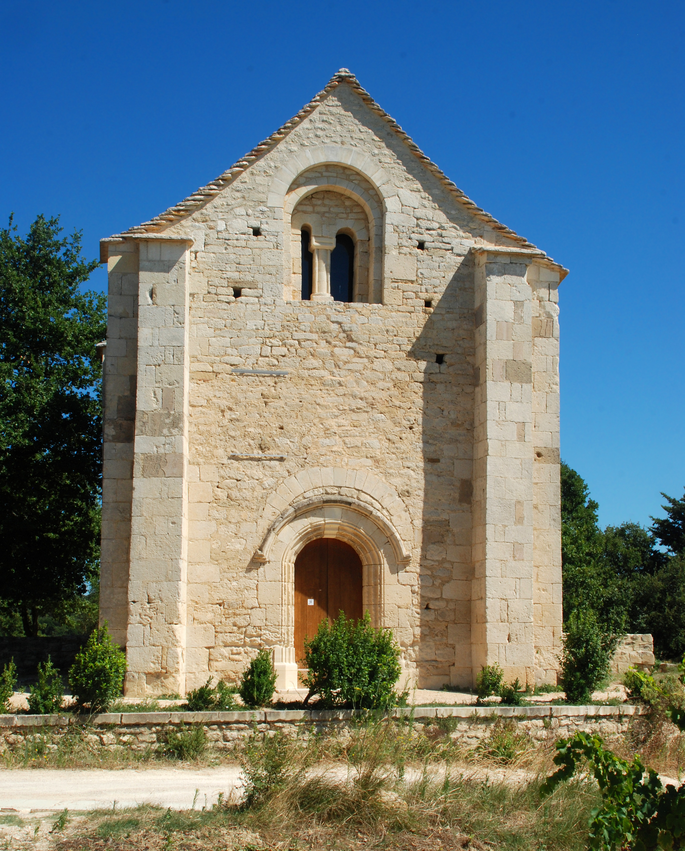 France - Gard - Chapelle Saint-Étienne de Saint-Hilaire-d'Ozilhan .